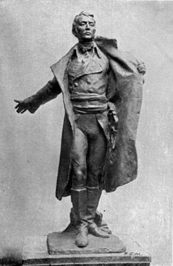 Projet de statue réalisé par Henri-Léon Gréber représentant Antonio Nariño. Photographie en noir et blanc.